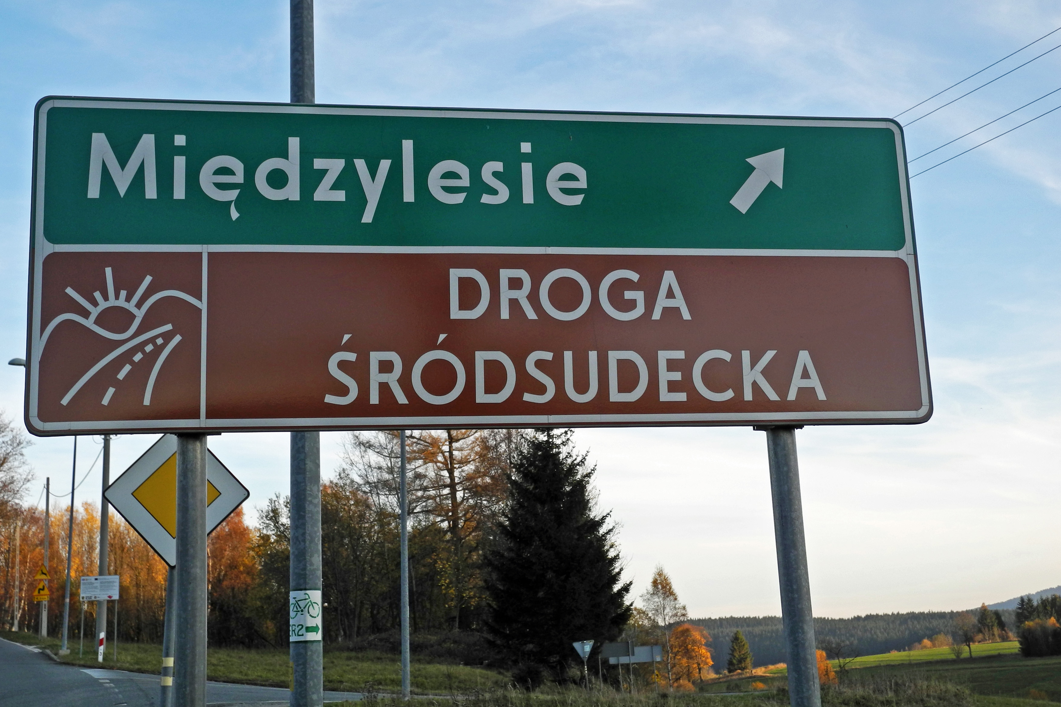 Touristisches Straßenschild als Hinweis auf die Sudetenstraße (Droga Śródsudecka – innere oder mittlere Sudetenstraße) in Mostowice (Langenbrück) im Glatzer Bergland